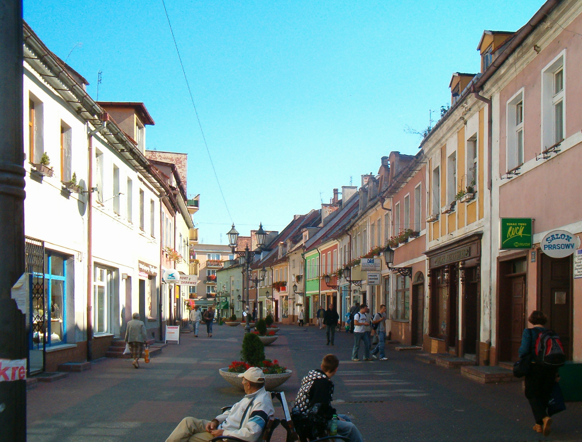 Wołów